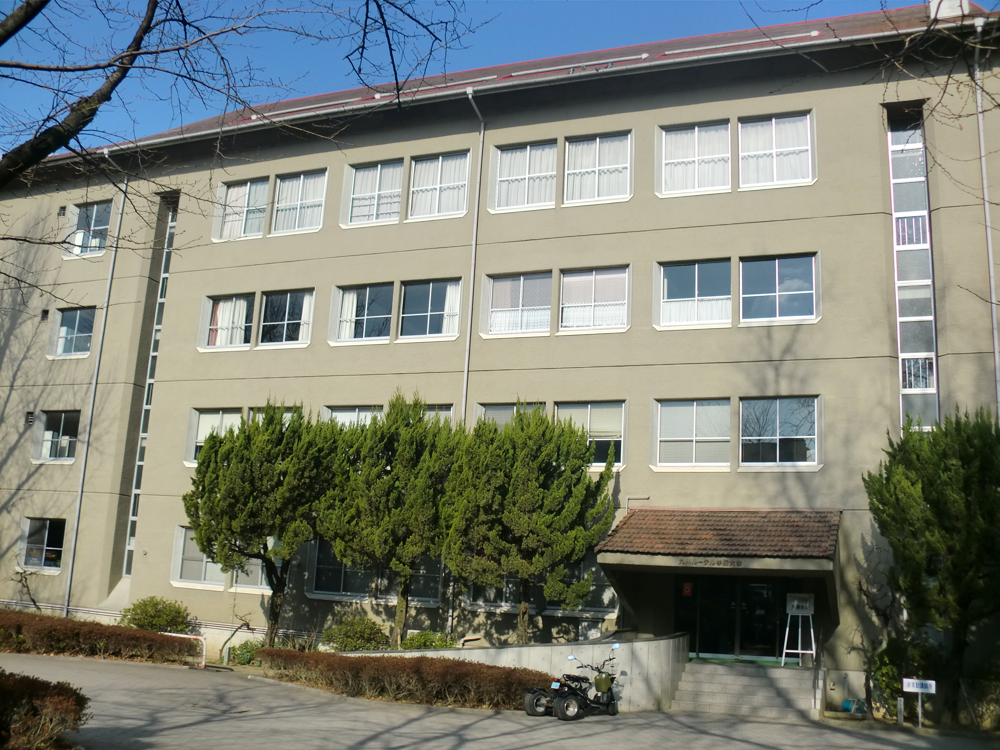 熊本市にある九州ルーテル学院大学